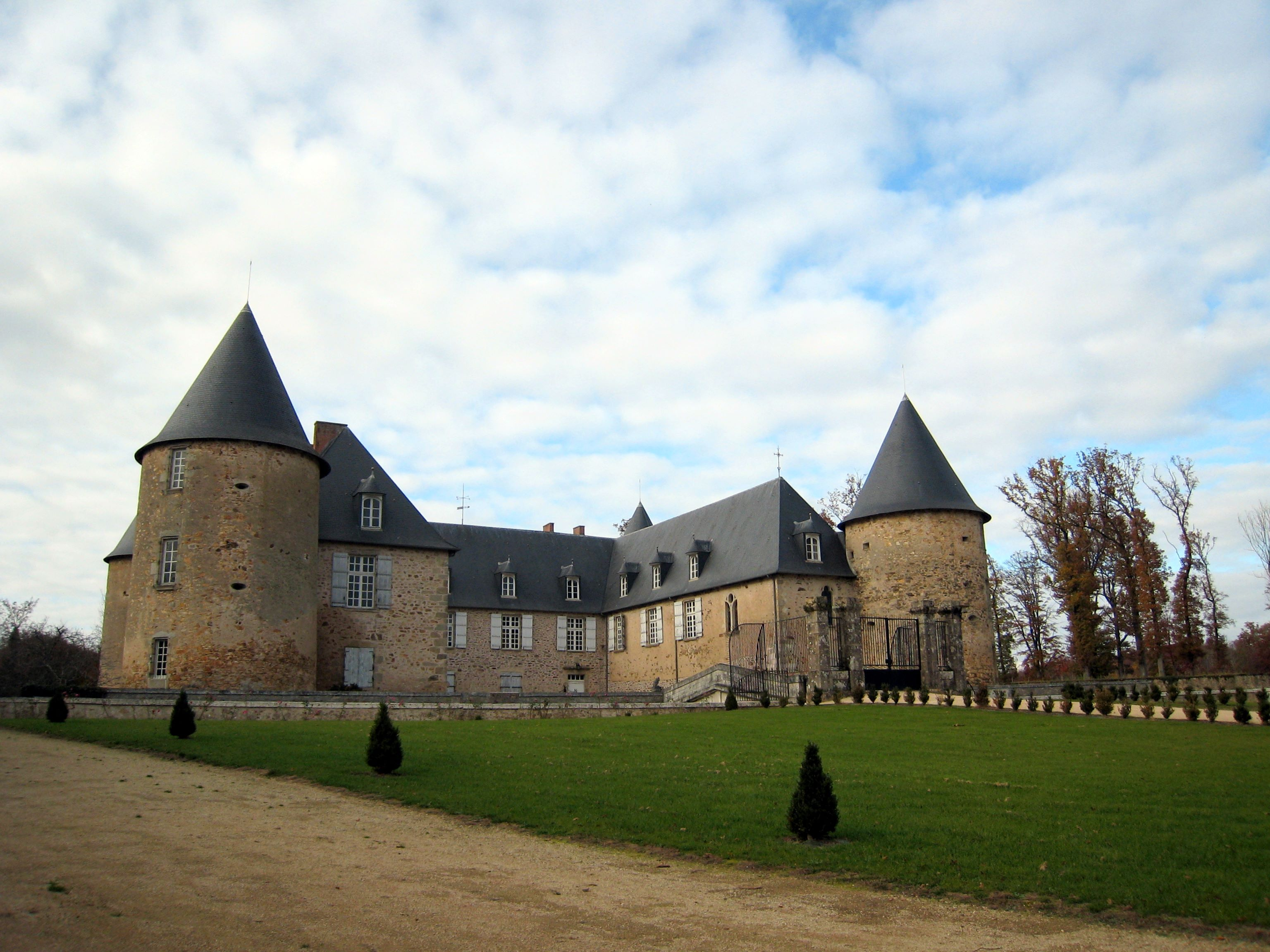 Château de Rochebrune à Étagnac